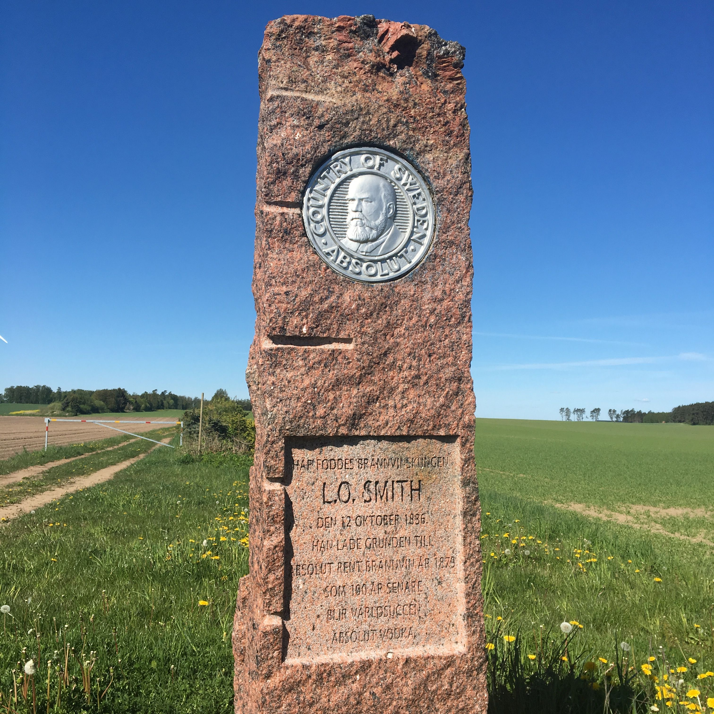 Minnessten över LO Smith i Kiaby.